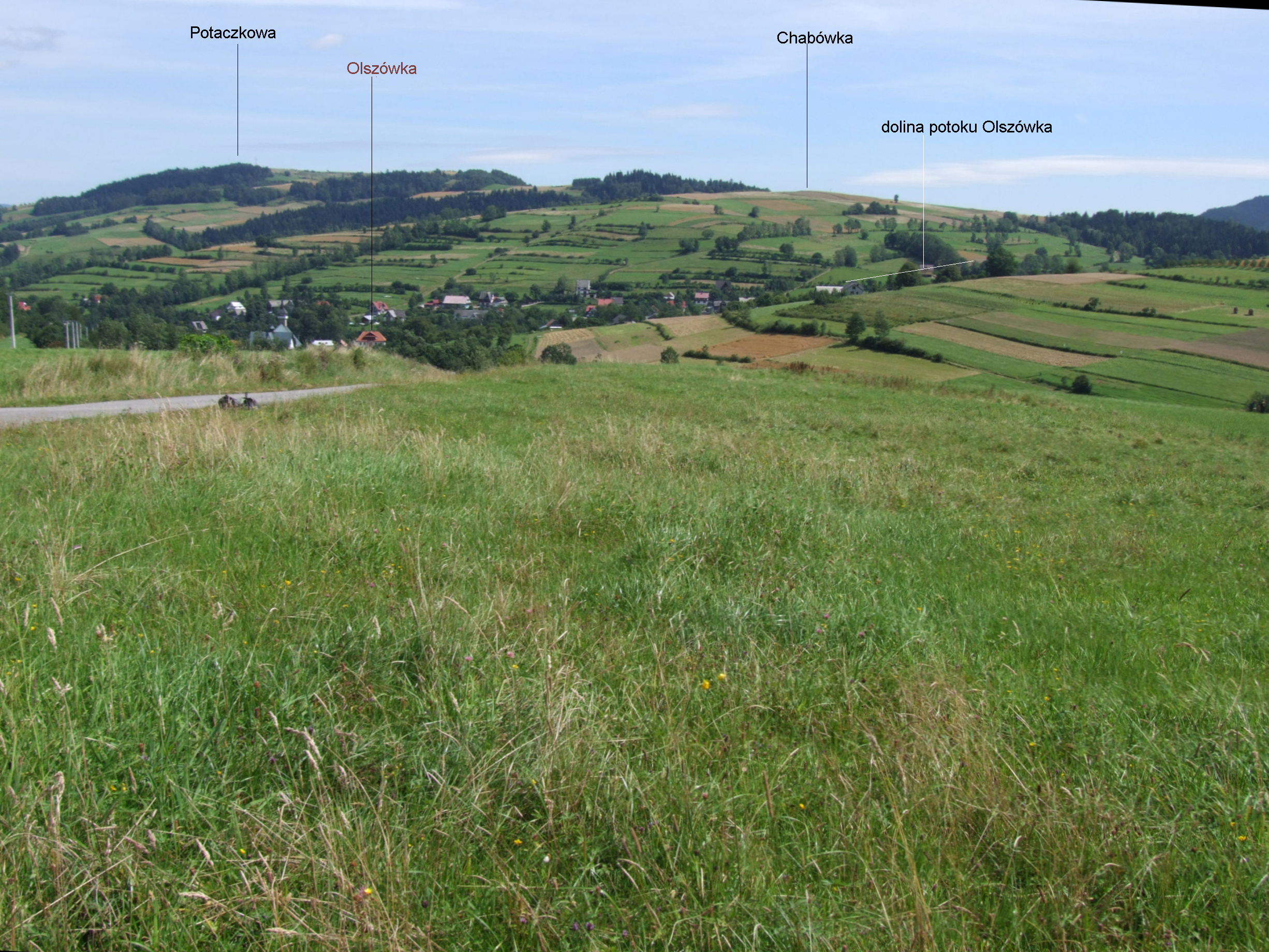 Widok z grzbietu nad Olszówką